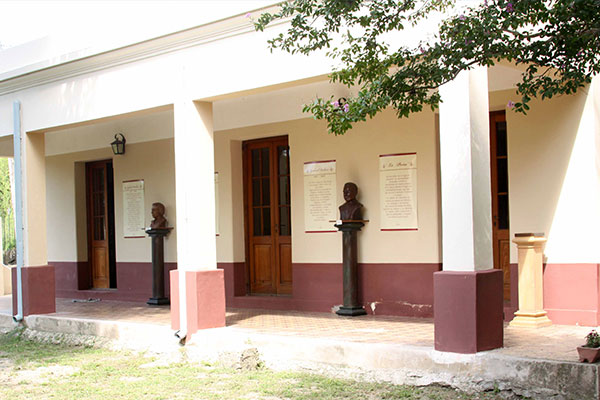 Museo de Arte Gabriel Dubois, Alta Gracia